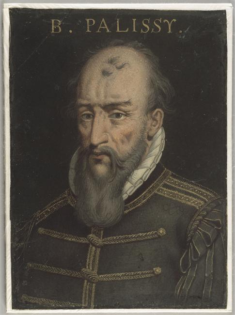 Bernard Palissy (* 1510; † 1589), Mitbegründer der protestantischen Gemeinde von Saintes und Emaillekünstler. Original im Musée de la Renaissance in Ecouen.